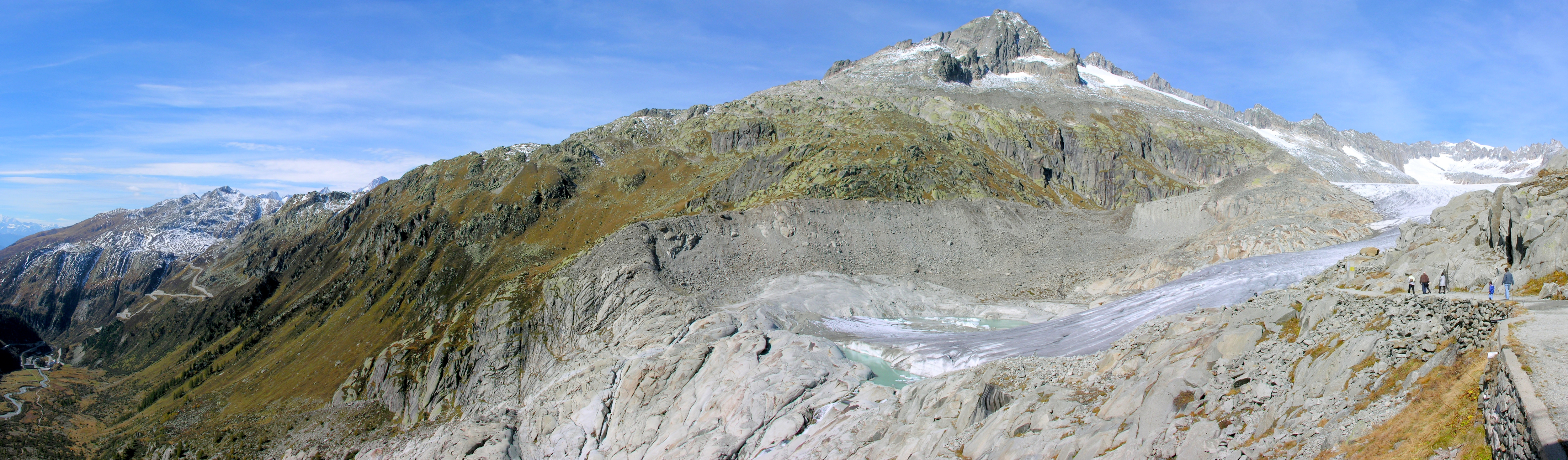 Switzerland, Valais, Rhone Glacier